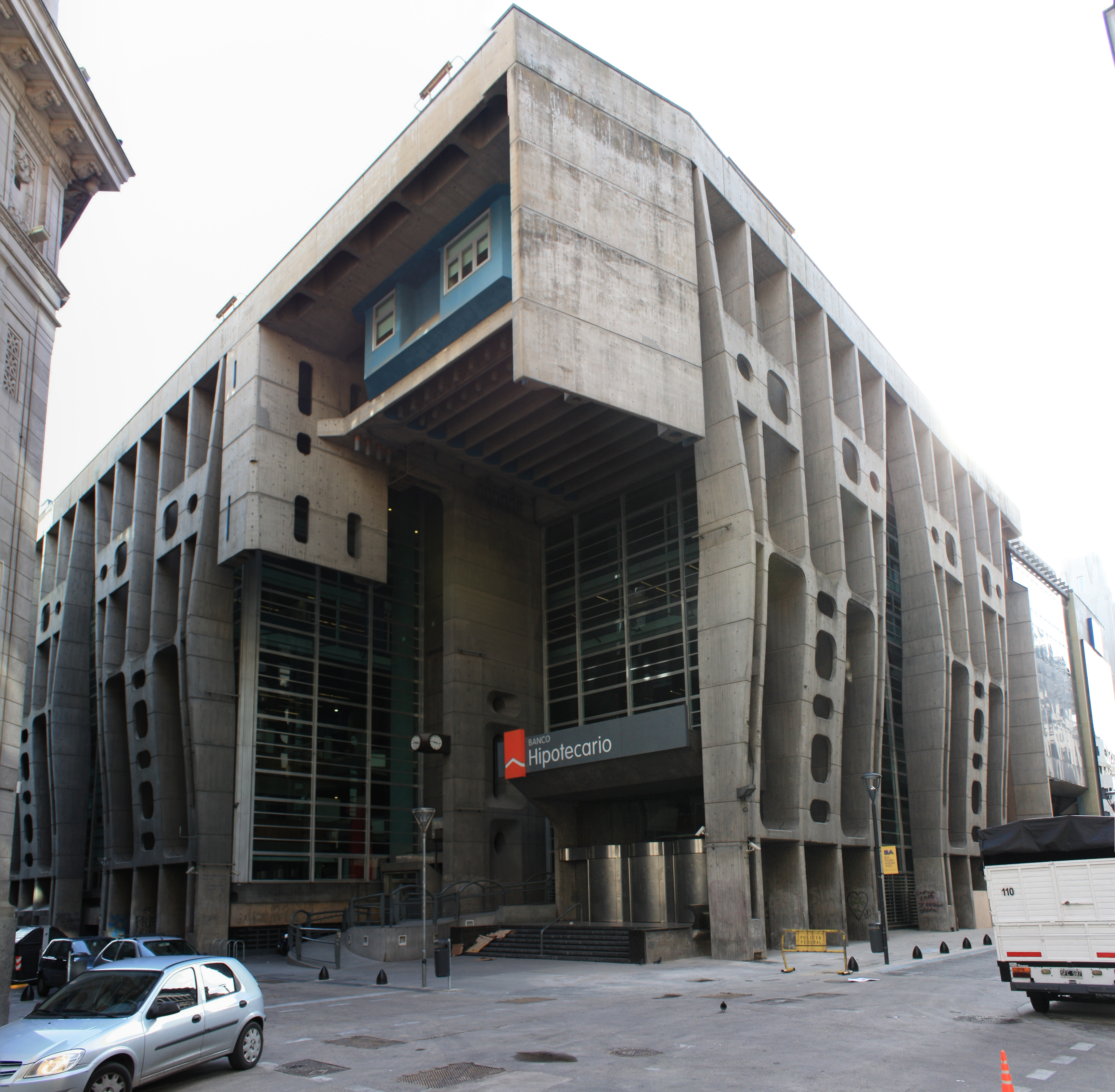 Banco hipótecario - Ex Banco de Londres